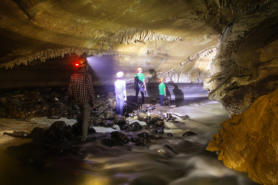 Hua ma cave